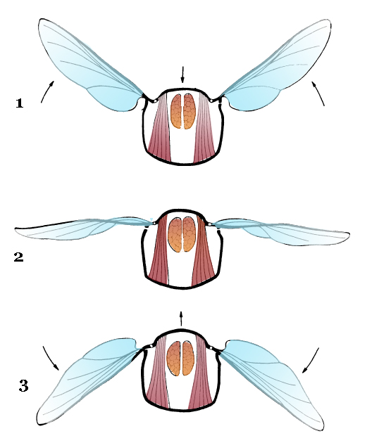 Схема, иллюстрирующая движение крыльев. 1 - Спинка опускается. крылья поднимется; 2 — крылья в среднем положении. 3 — спинка поднимается, крылья опускался